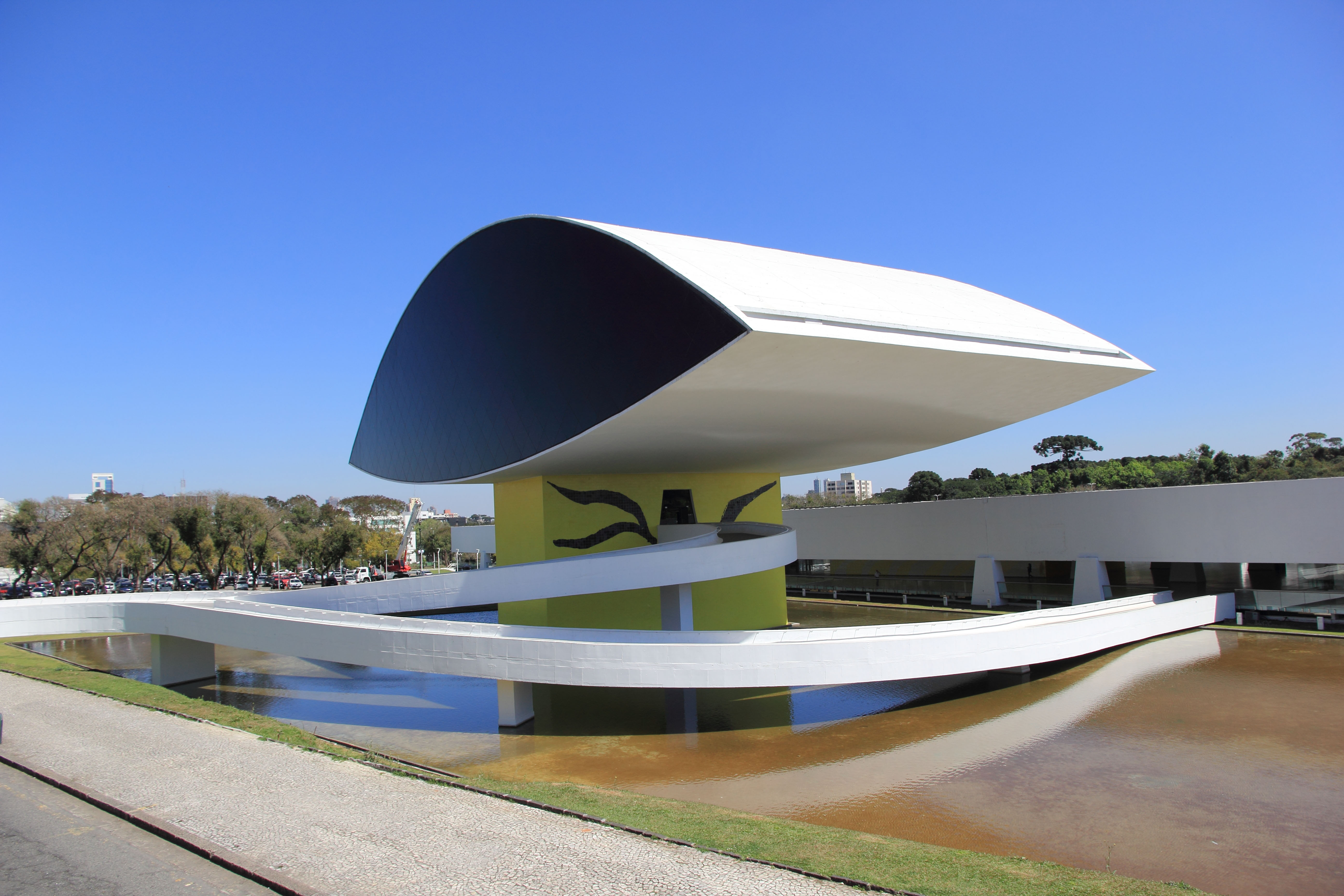 O Museu Oscar Niemeyer (MON) é um espaço dedicado à exposição de Artes Visuais, Arquitetura, Urbanismo e Design.